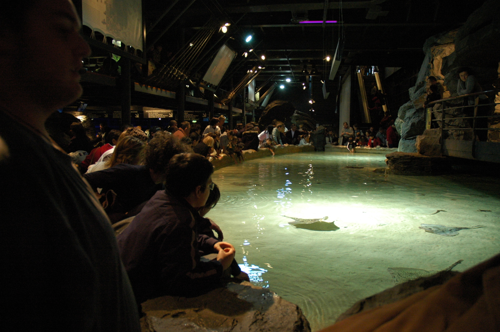 Vasca delle razze (Acquario di Genova, Italy)